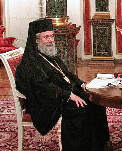 Архиепископ Новой Юстинианы и всего Кипра Хризостом II